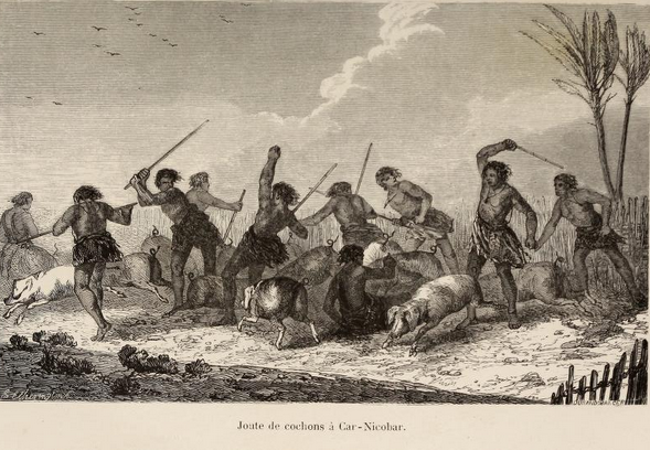 Arthur Mangin, Voyages et Découvertes outre-mer au XIXe siècle, illustrations par Durand-Brager, 1863 ː Les îles Nicobar.